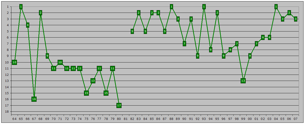 Tabellenpositionen des SV Werder Bremen zum Saisonende